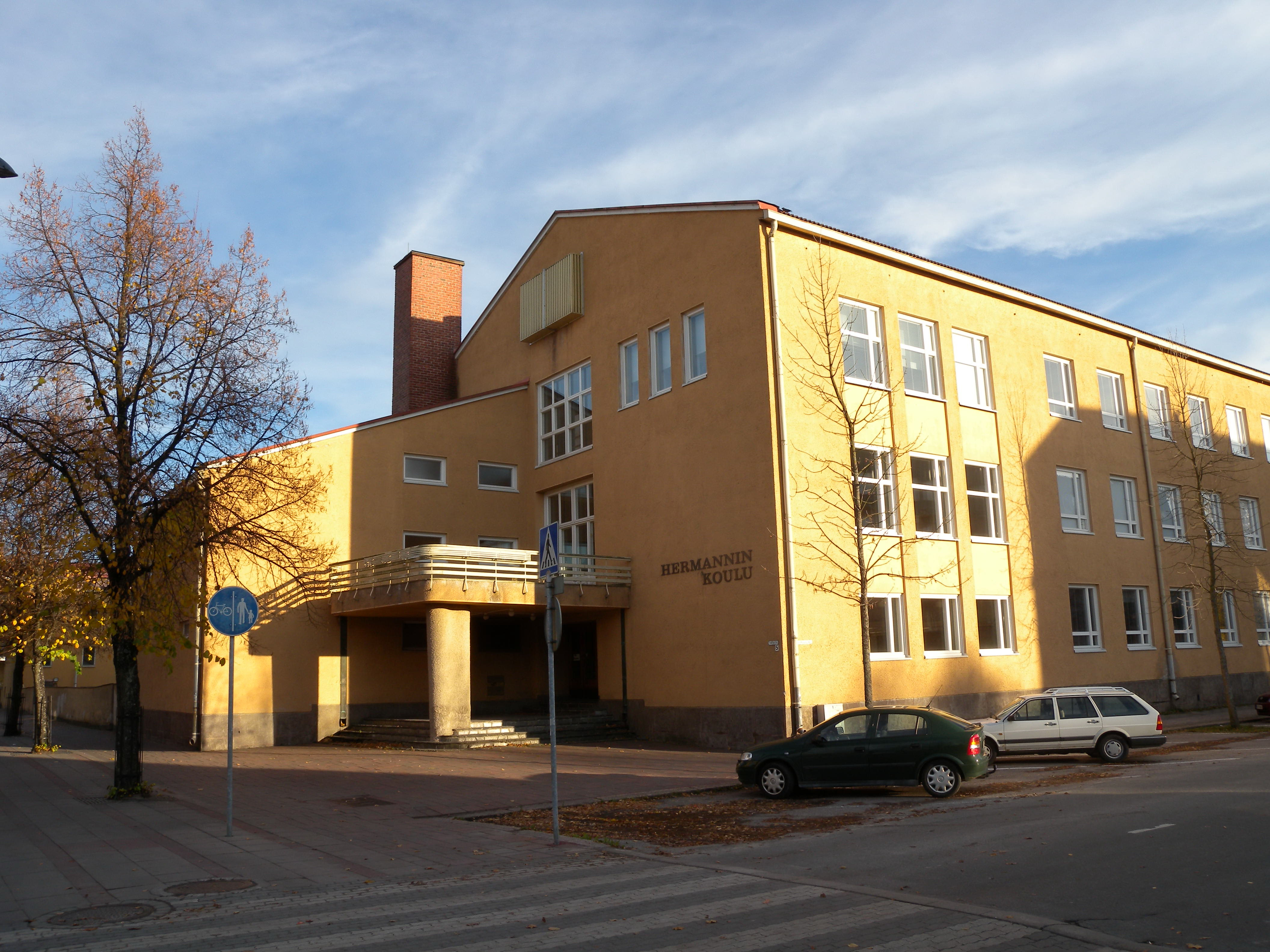 Hermannin koulu Salosssa torikatu 3:ssa